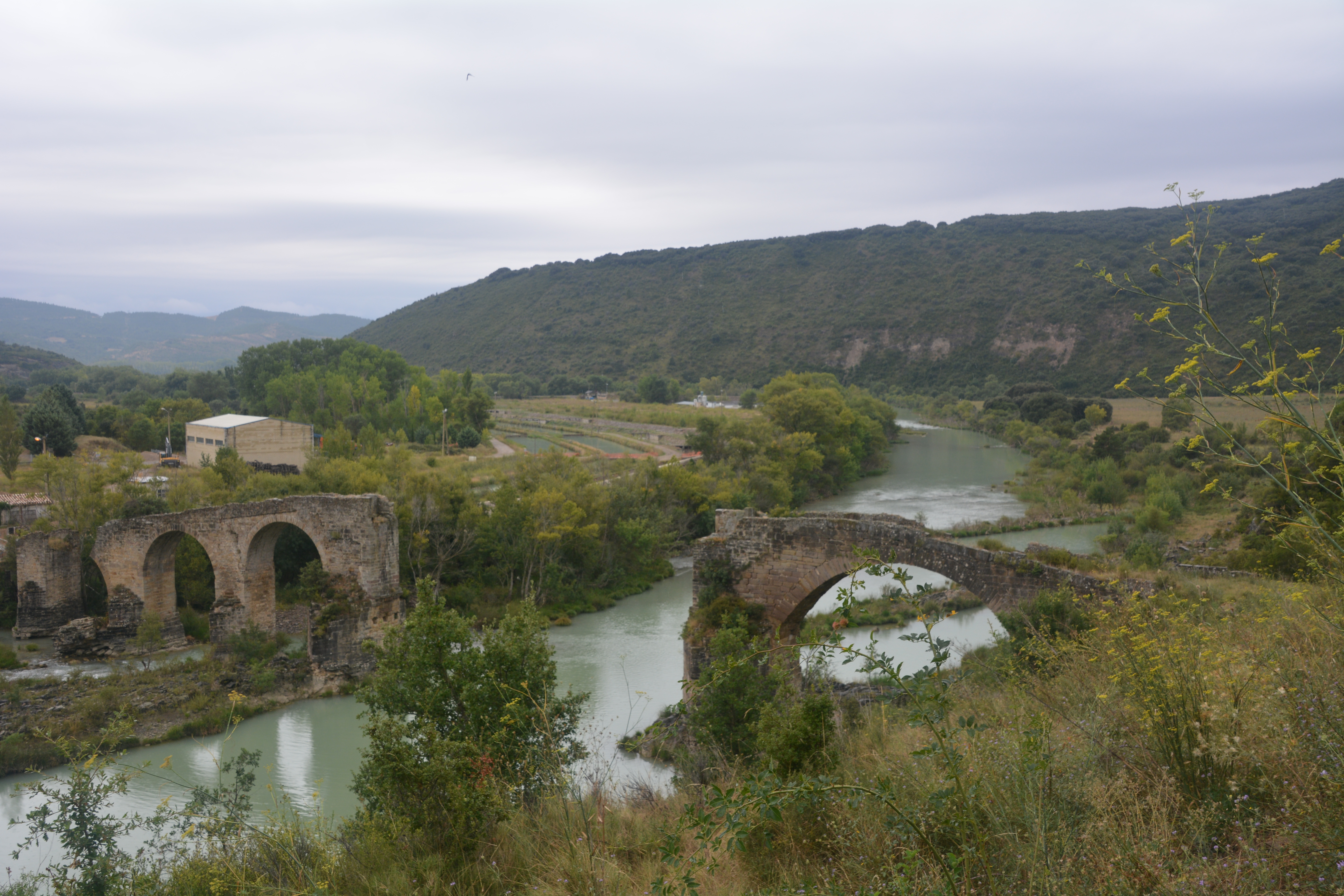 Tramo medio del río Aragón This is a photography of a Special Area of Conservation in Spain with the ID: ES2200030. Natura2000 entry, EEA entry